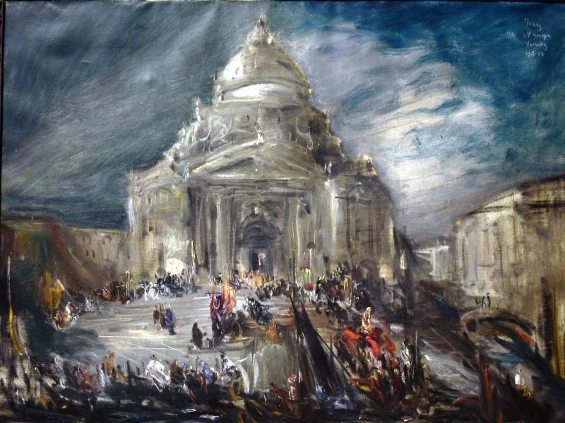 Venedig